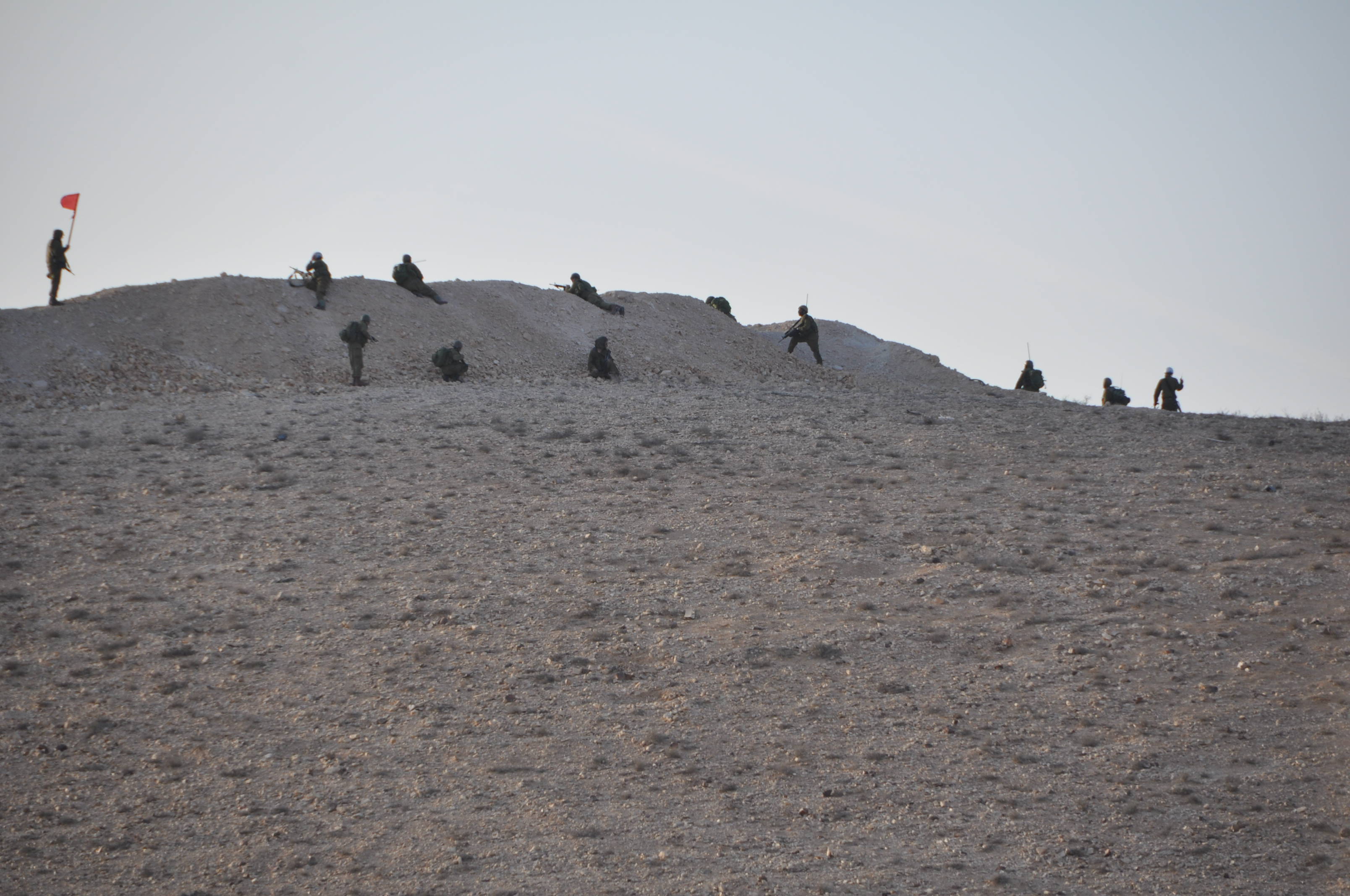 חיילי גדוד 413 באימון